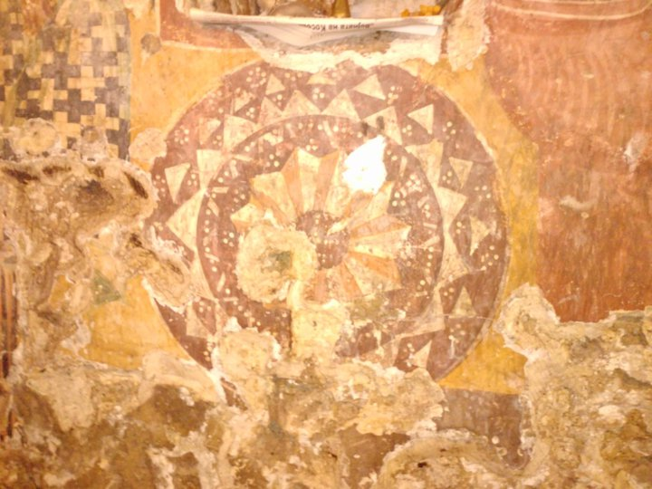 Приказ на сонцето на штит во Црквата Св. Ѓорѓија во с. Лазоровци, внатрешното е со дванаесет краци а надворешното со шеснаесет краци и украсено со орнаменти. Внатрешното дванаесет крако сонце го има насликано на повеќе места и цркви во Македонија а го има во службена употреба и АРМ.